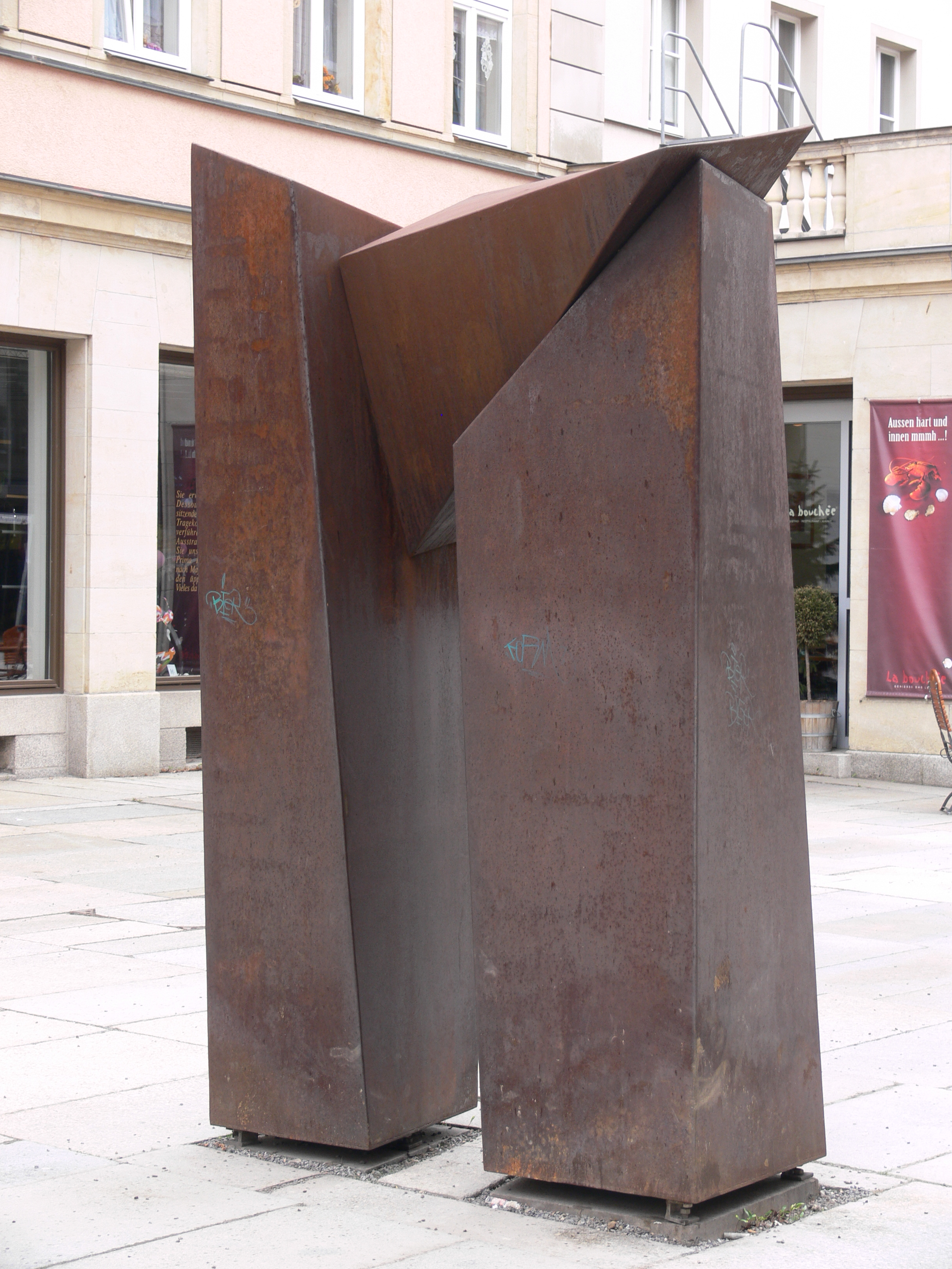 Wolfram Schneider (* 1942): Sicile Tor, Cor-Ten-Stahl, 1999 (seit 2001 in der Inneren Klosterstraße, Chemnitz)